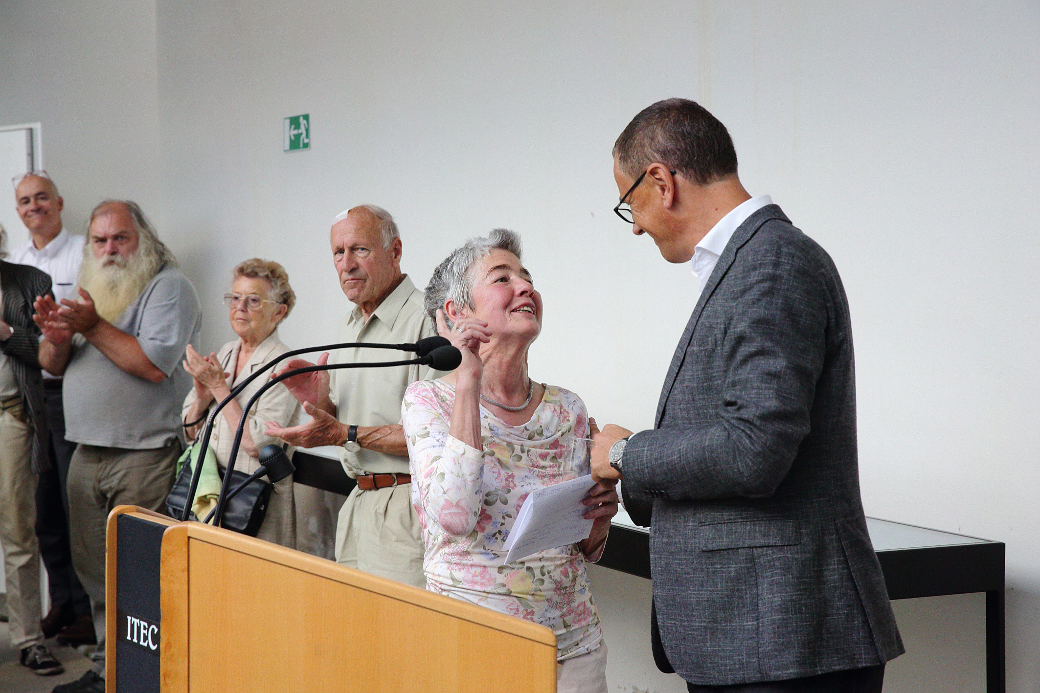 Eva Kreissl und Wolfgang Muchitsch